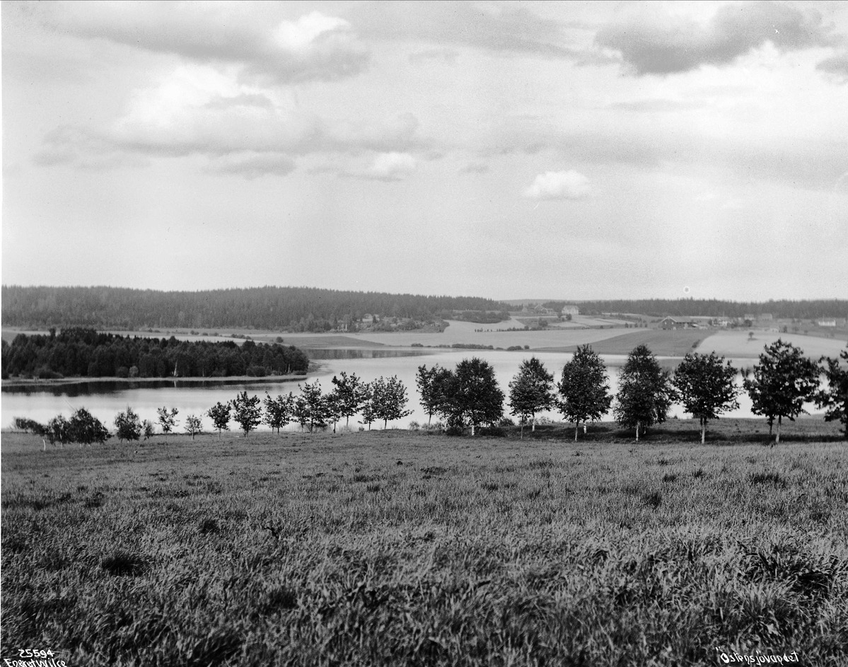 Østensjøvannet ca. 1910.